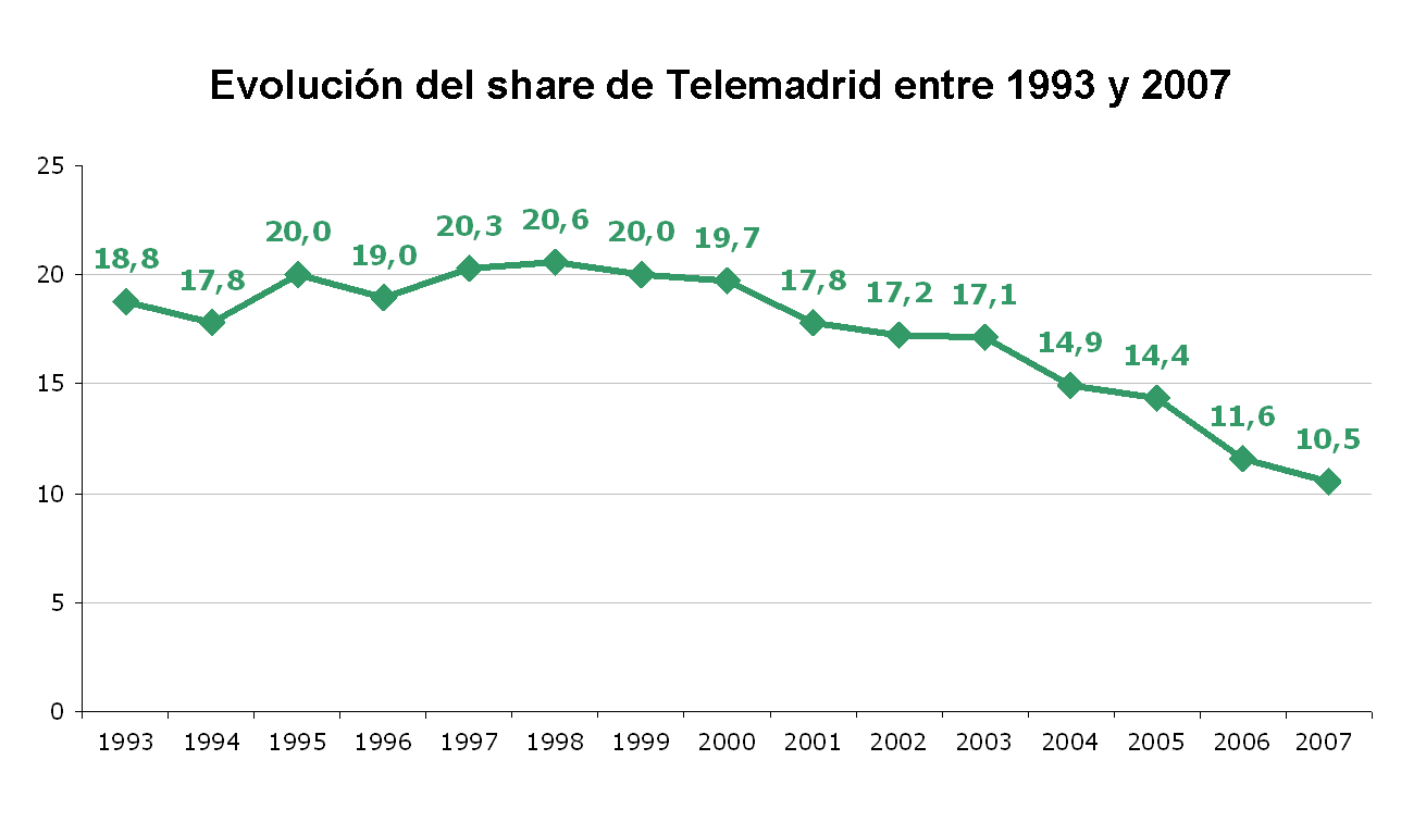 Evolución de la audiencia de Telemadrid (share)